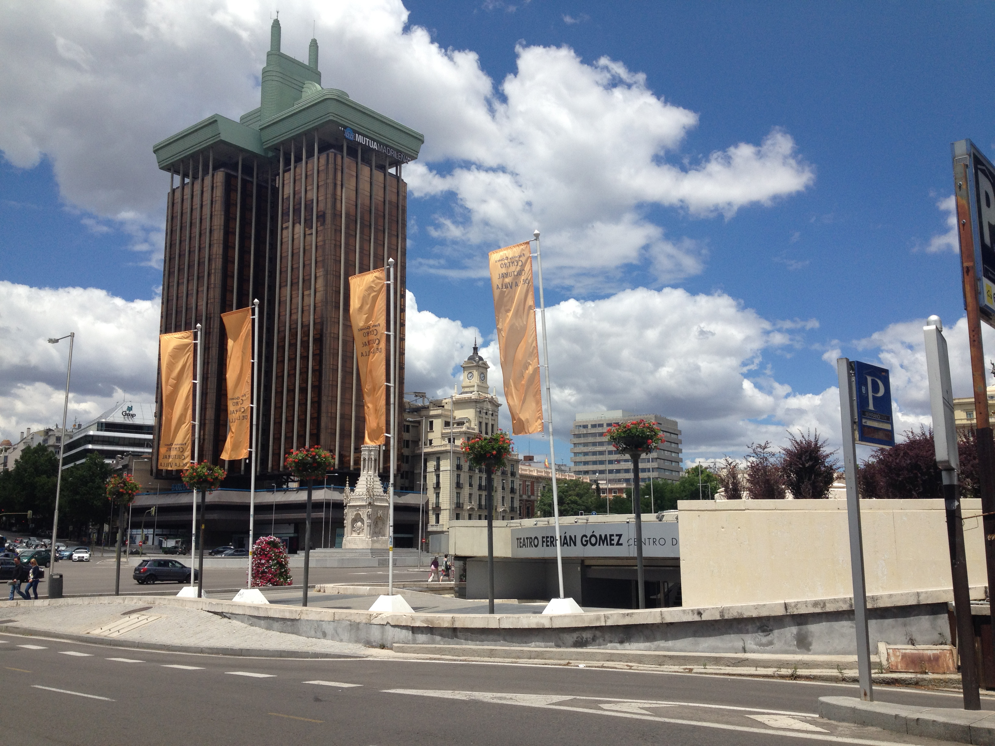 Teatro Fernán Gómez y las Torres de Colón en la Plaza de Colón de Madrid